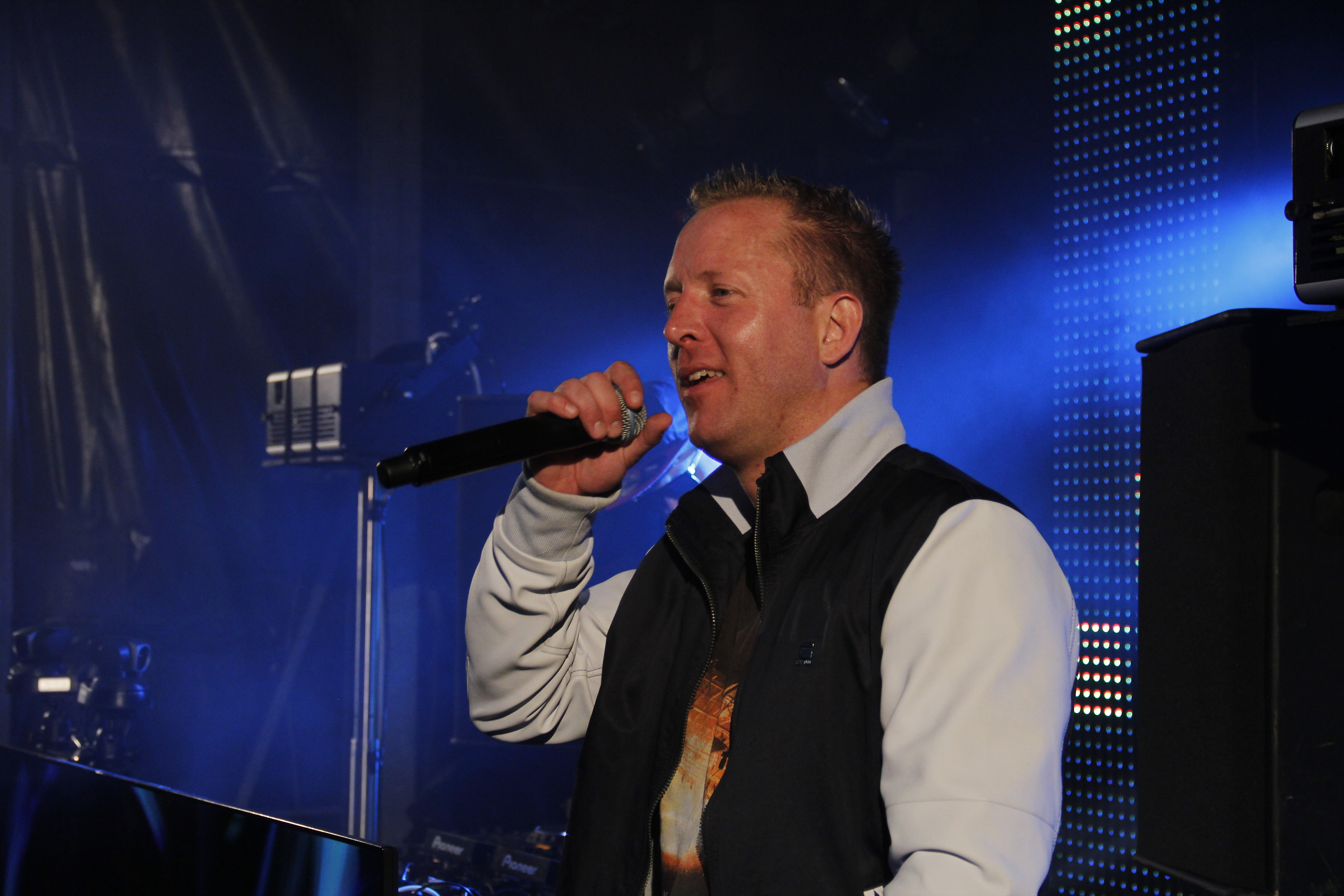 Vato Gonzalez tijdens BevrijdingsDance in Emmen (2013)